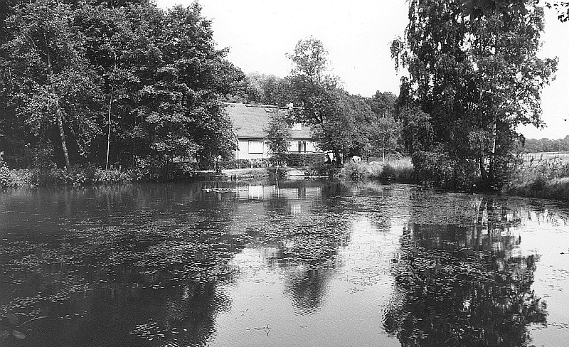 Original image description from the Deutsche Fotothek Hochkirch-Lehn. Mühlteich